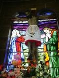 Santo patrono de Sativasur